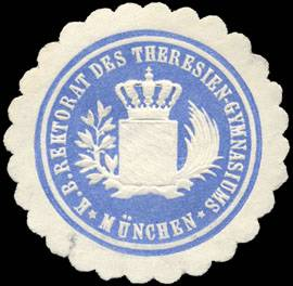 Sealing stamp Title: Königlich Bayerische Rektorat des Theresien - Gymnasiums - München Description: hellblau, weiß, geprägt Place: München size: 4 cm